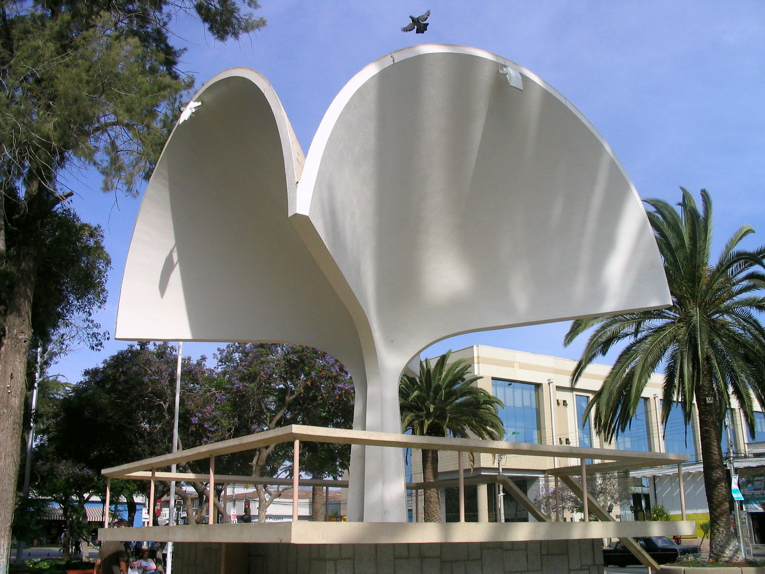 Kiosco Plaza de Armas de Ovalle, postal característica de la ciudad.